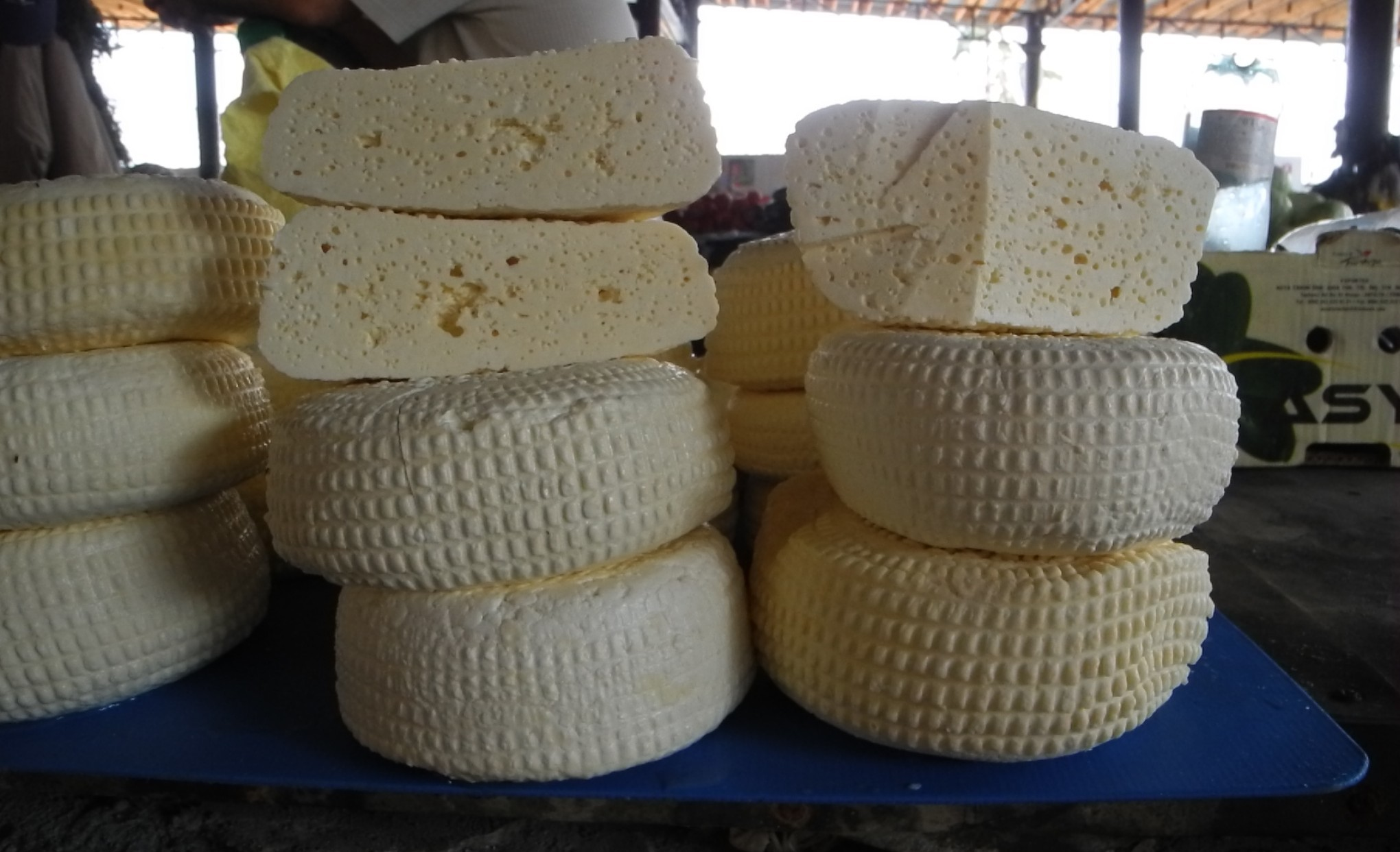 Telavi - Bauernmarkt03